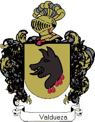 Valdueza